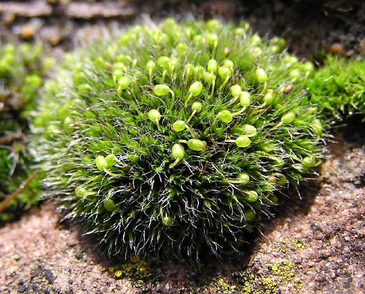 Grimmia pulvinata auf einer Mauer bei Heidelberg